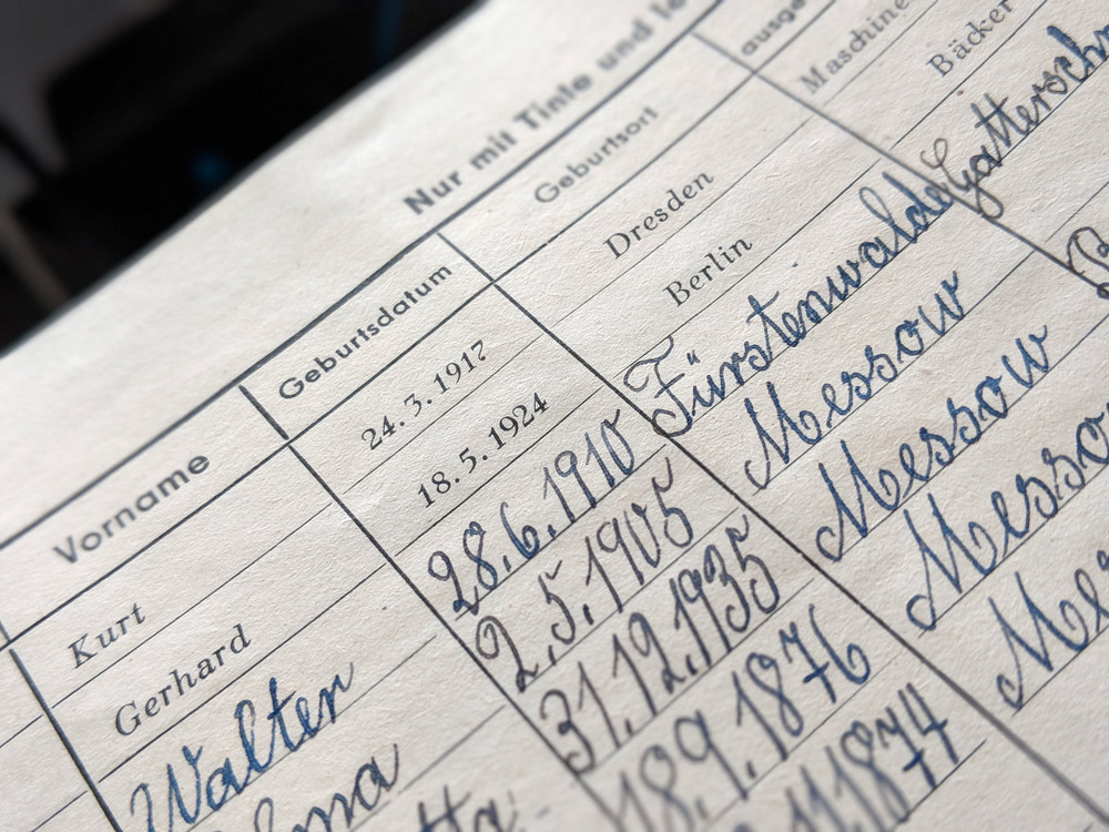 Typisches Detail aus einem Hausbuch der DDR von 1952.